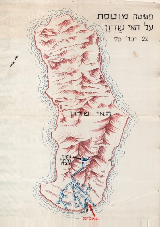 פשיטה מוטסת על האי שדואן ב- 20.1.70, עם תאור מקום נחיתת הכוחות וציר הפעולה לעבר מקום המכ"ם - ציור. מ-תאריך: 20/01/1970 עד-תאריך: 20/01/1970. הועמד לעיון הציבור: כן.